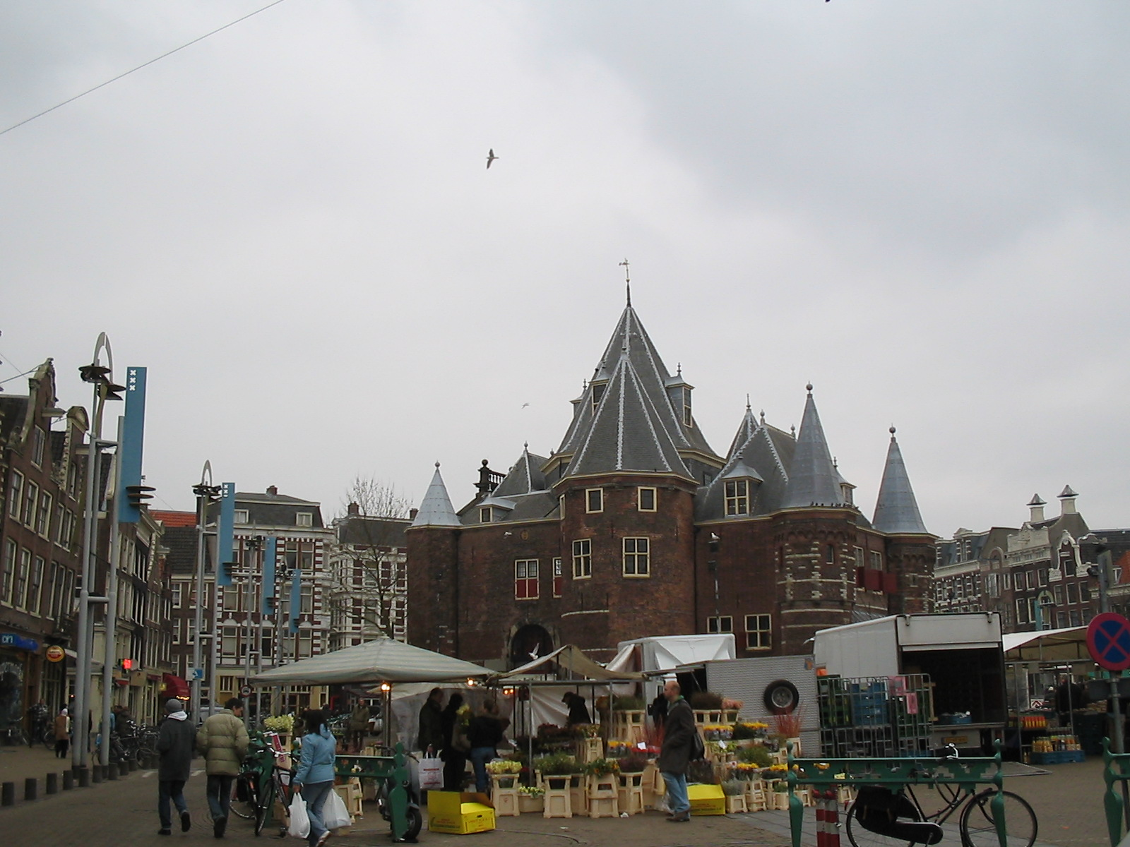 Nieuwmarkt. Alternative version: Image:Nieuwemarkt-edit.jpg